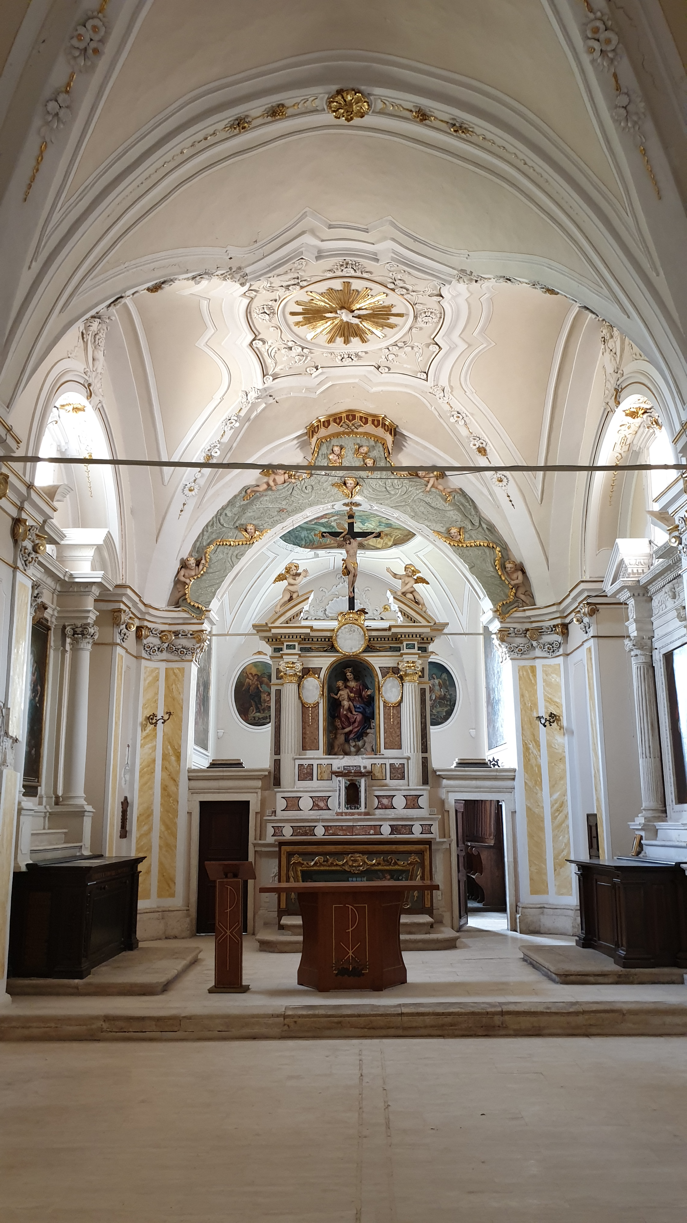 Convento di Sant'Angelo d'Ocre (AQ)